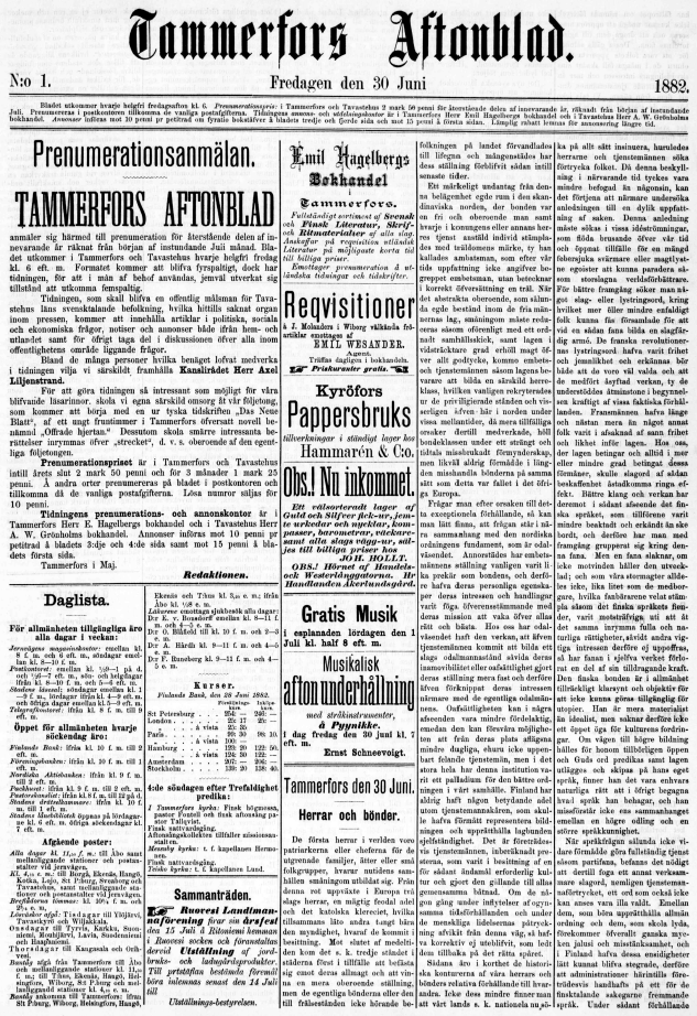 Tammefors Aftonblad -lehden ensimmäisen numeron etusivu